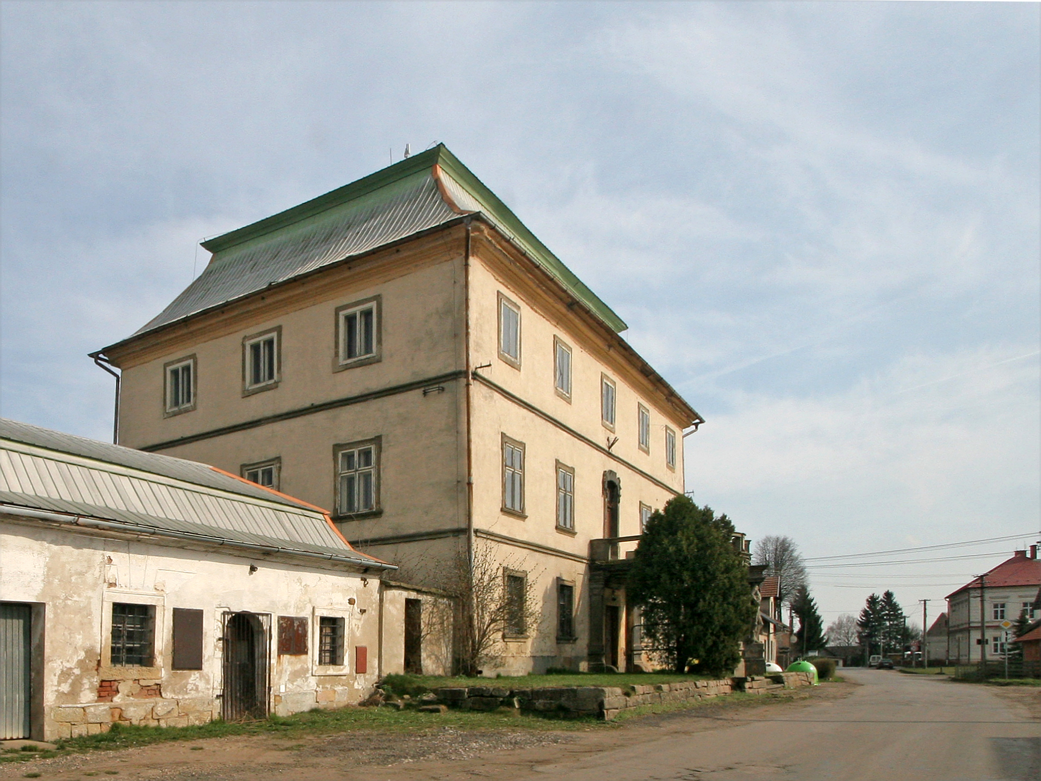 Zámek Volanice, Volanice